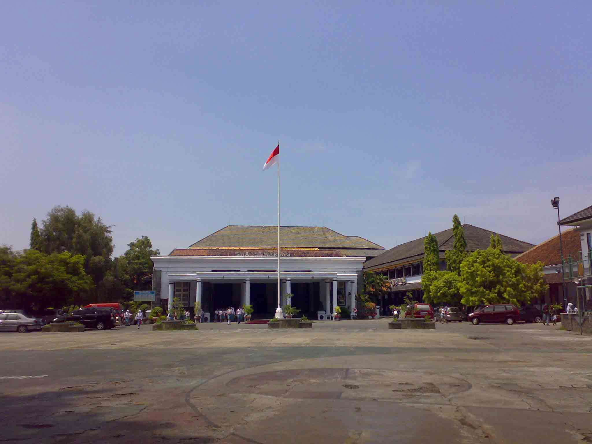 Sma 3 semarang